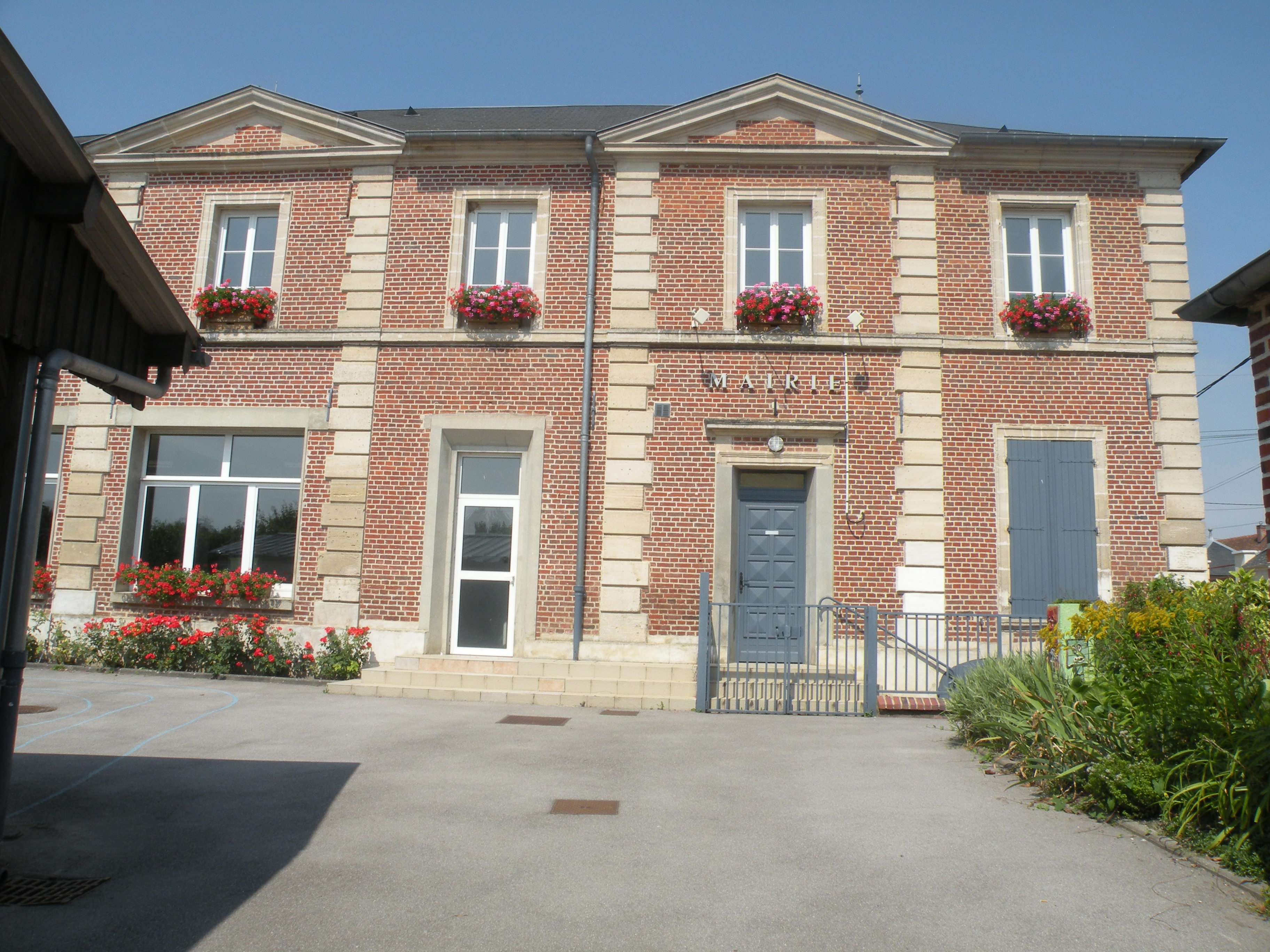 Laversines mairie